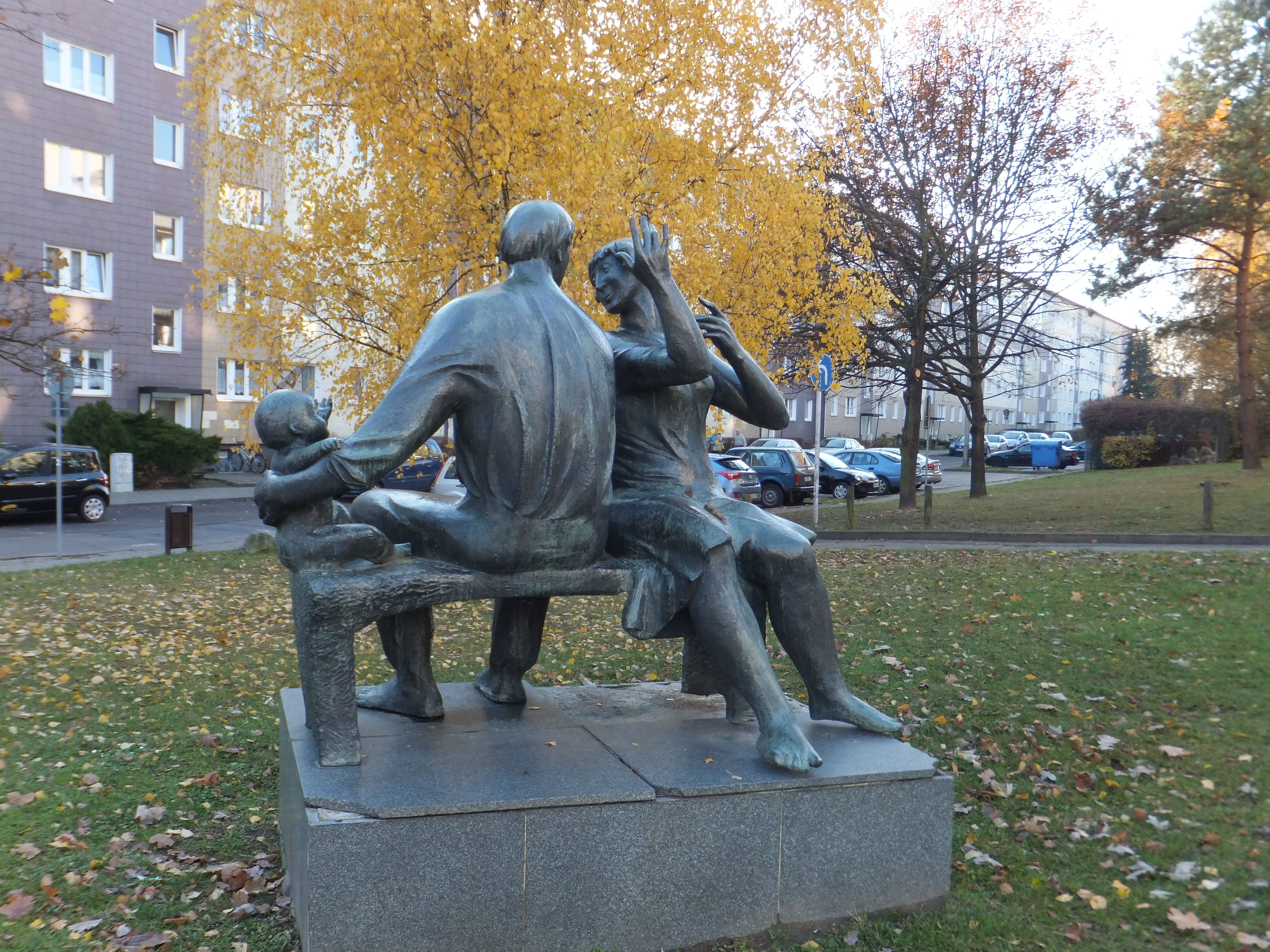 Bildhauerin Margit Schötschel-Gabriel: “Familie“